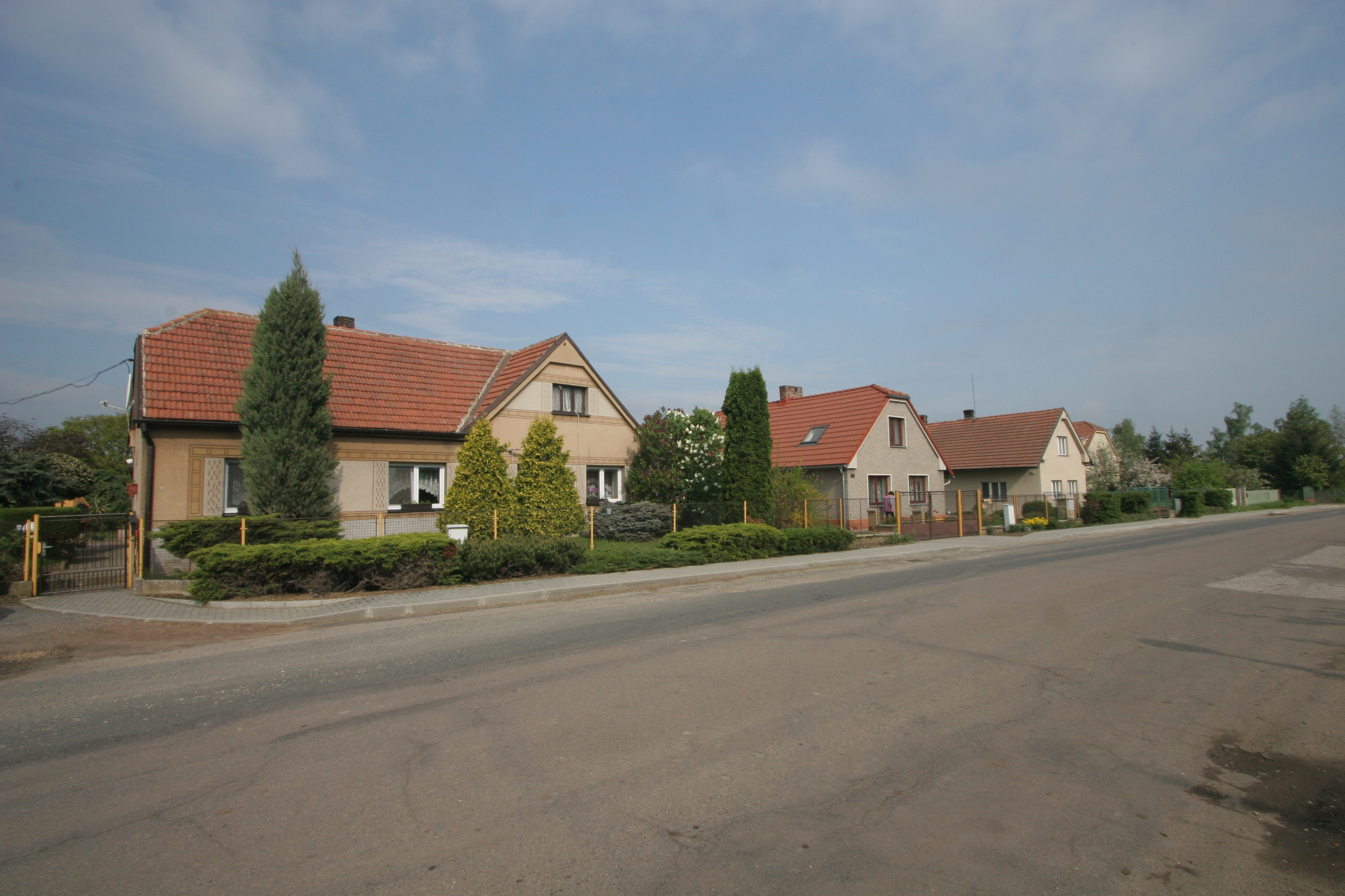 Malé Výkleky čp. 33